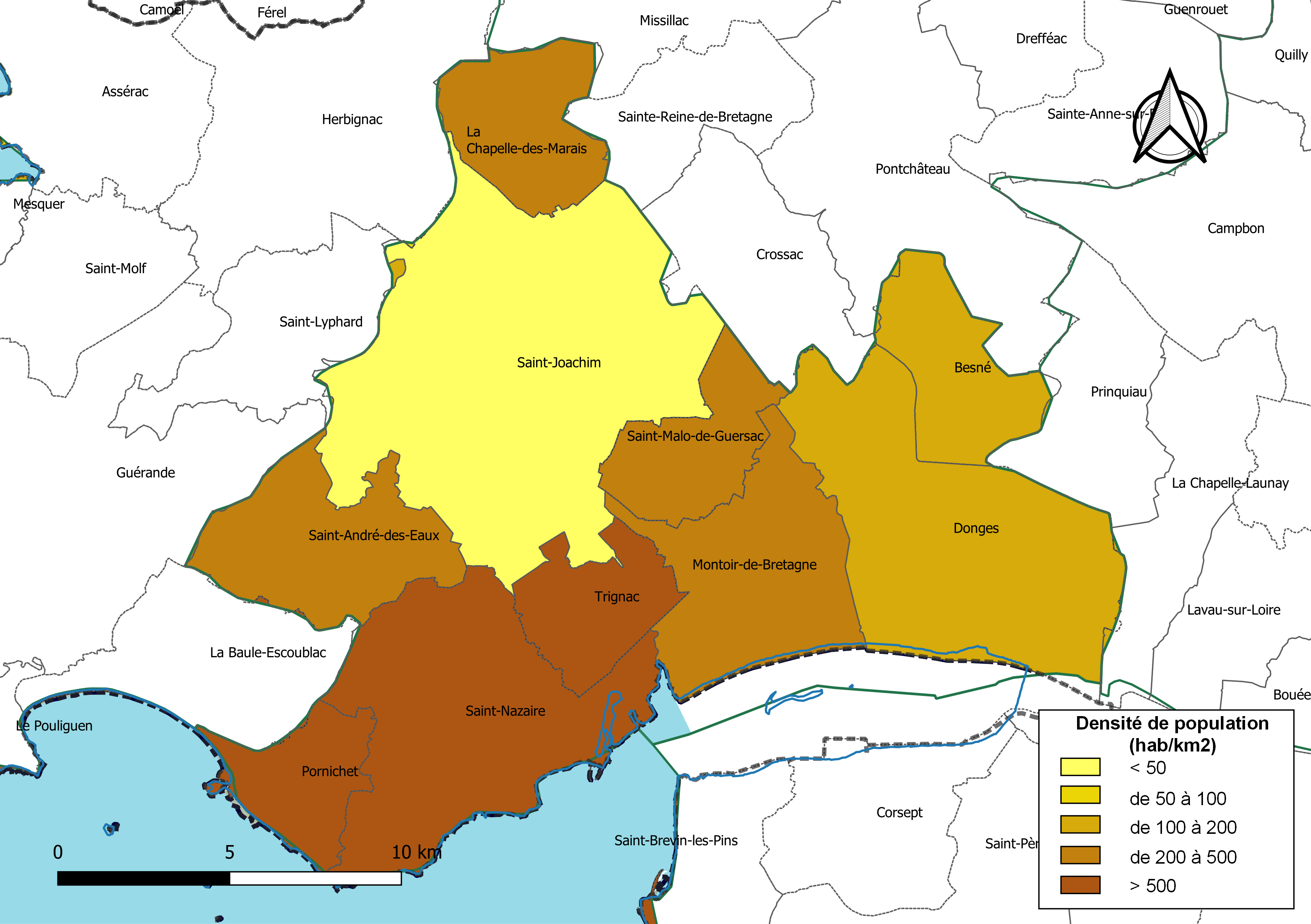 Carte des densités de population (millésimée 2016) des communes de la Communauté d'agglomération de la Région Nazairienne et de l'Estuaire, département de la Loire-Atlantique, France. Composition au 1er janvier 2019.